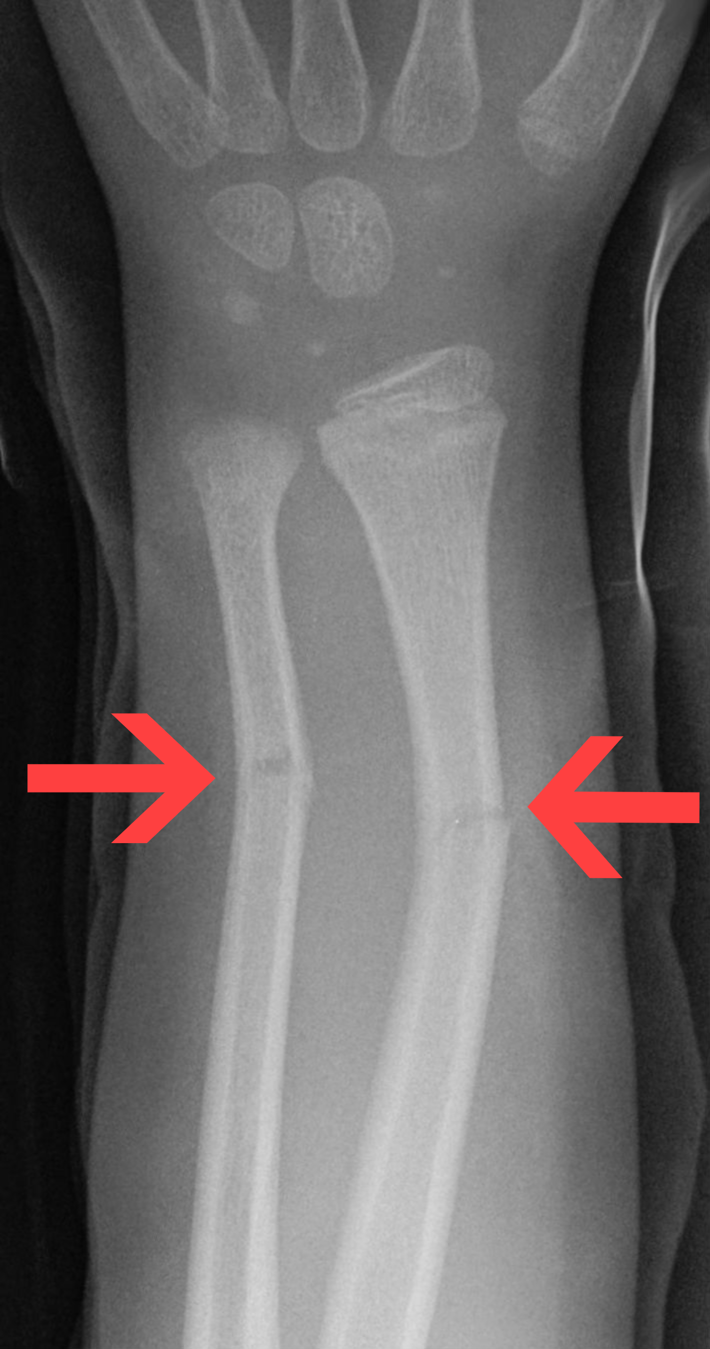 Grünholzfraktur von Ulna und Radius (Unterarmfraktur).